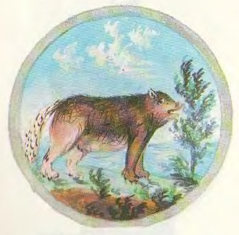 Беларуская (тарашкевіца): Герб Воўпа (Voŭpa)